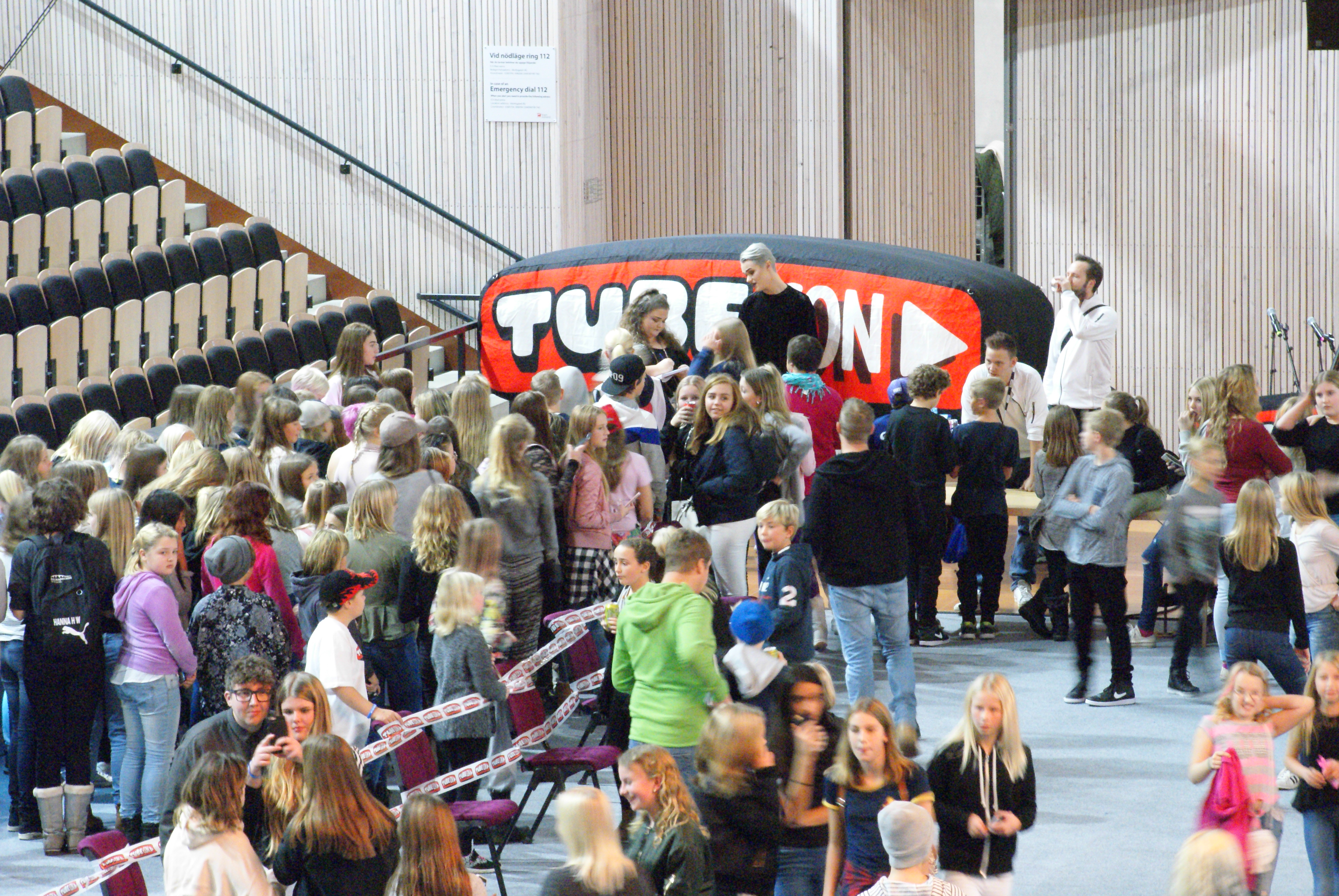 Tubecon 2016 i Visby.